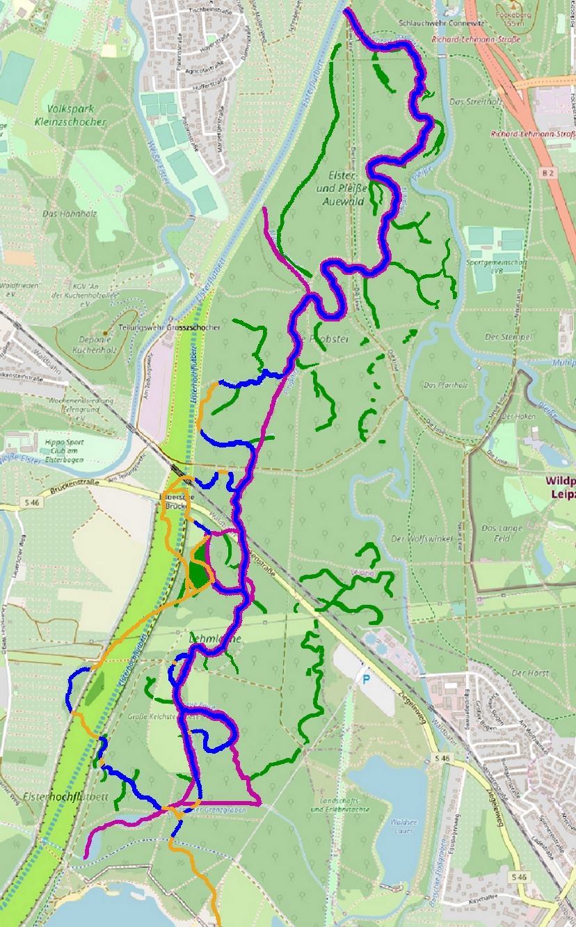 ursprüngliches Flussbett (blau) mit Unterbrechnungen (gelb) und heutiger Durchströmung (pink) sowie heutige Lachen und Altarme (grün)